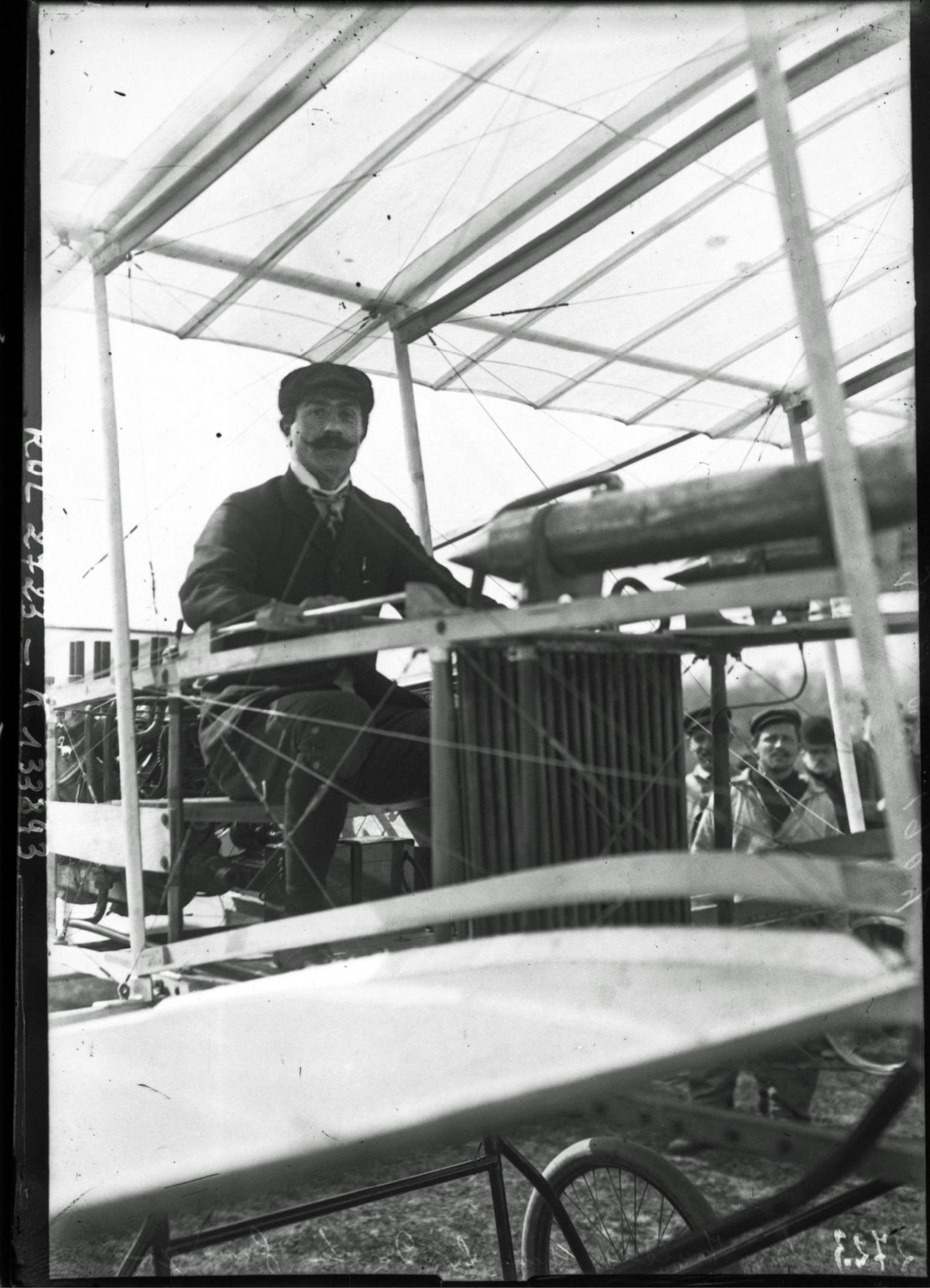 Charles Voisin am 30. März 1907 auf dem Flugfeld im Park Bagatelle in der Voisin-Delagrange